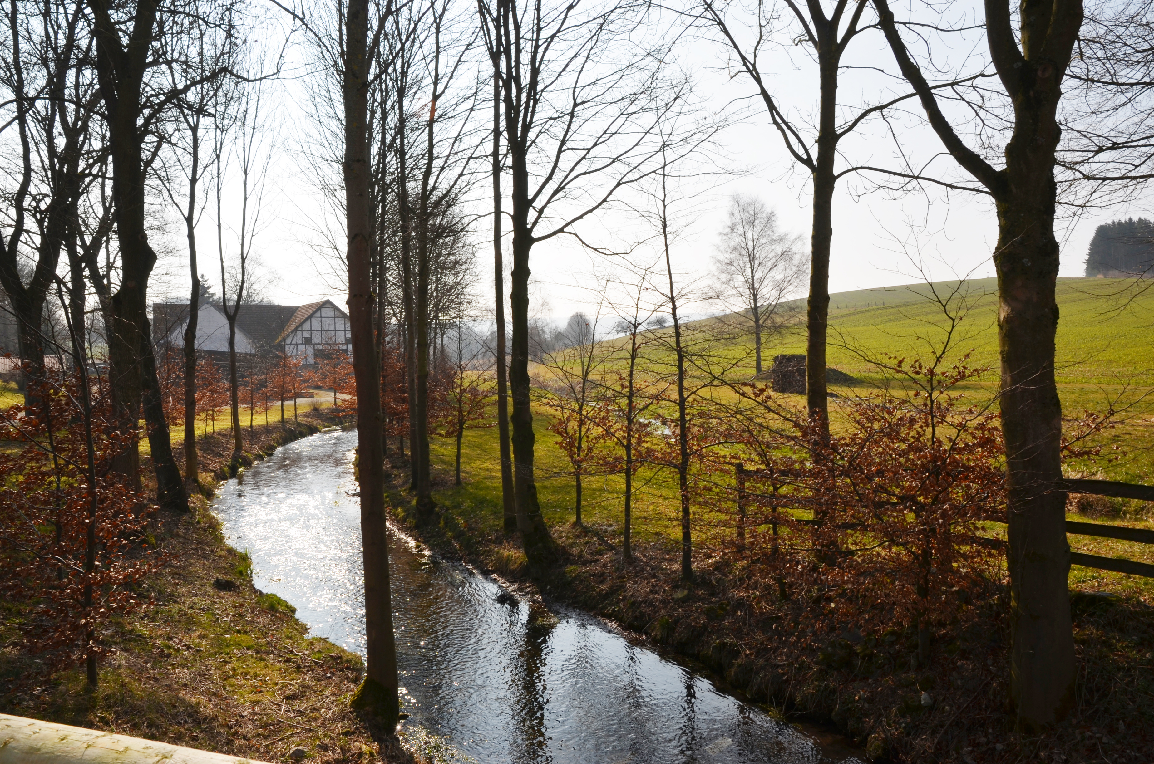 Brilon, die Aa bei der 3. Aamühle (5)